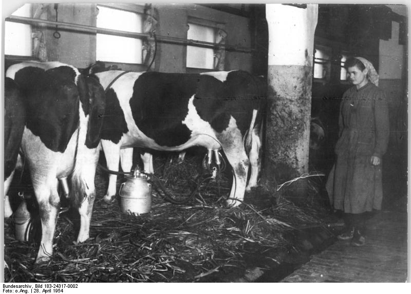 Kauern, Bäuerin beim Melken Zentralbild Bauernbild Ho-Sta. 2 Mat. 28.4.1954 Elektrische Melkanlage in der LPG "Wilhelm Pieck" in Kauern, Kreis Gera Die Genossenschaftsbauern der LPG "Wilhelm Pieck" in Kauern, Kreis Gera, haben eine elektrische Melkanlage erhalten. Diese technische Neuerung bringt den Genossenschaftsbauern bei der Betreuung des Viehs eine grosse Arbeitserleichterung und Zeitersparnis. UBz: In Kuhstall der Genossenschaft wird elektrisch gemolken.